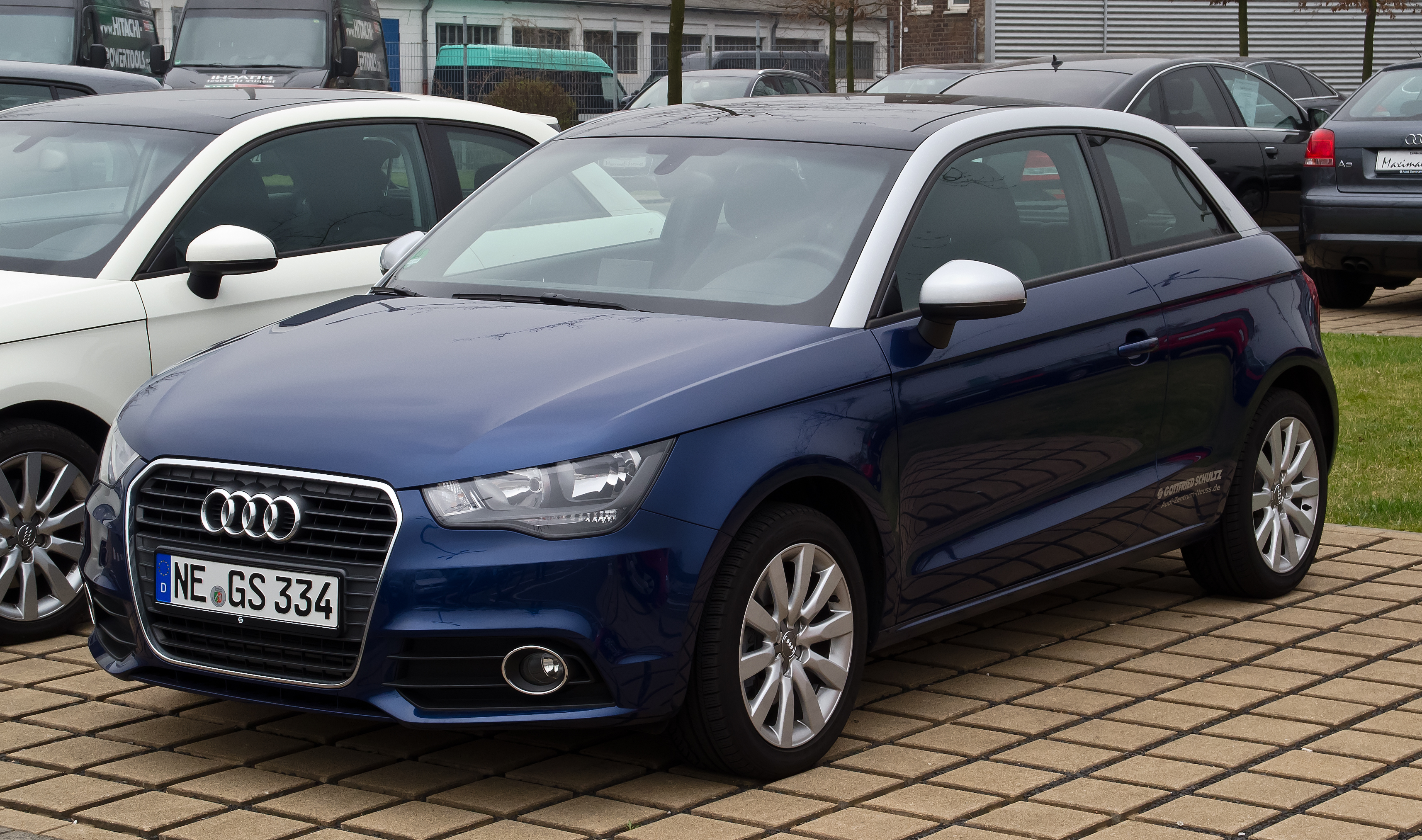 Audi A1 1.6 TDI Ambition